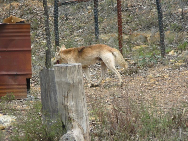 Dingo